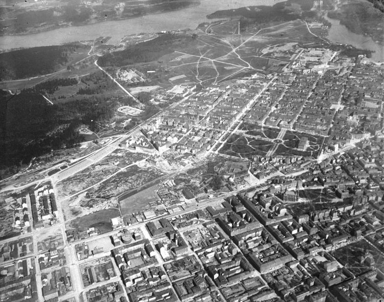 Flygbild från ballong från ca 400 m höjd - Ballon Captive - över Östermalm med Humlegården och Vasastan. Fotonummer E 22624